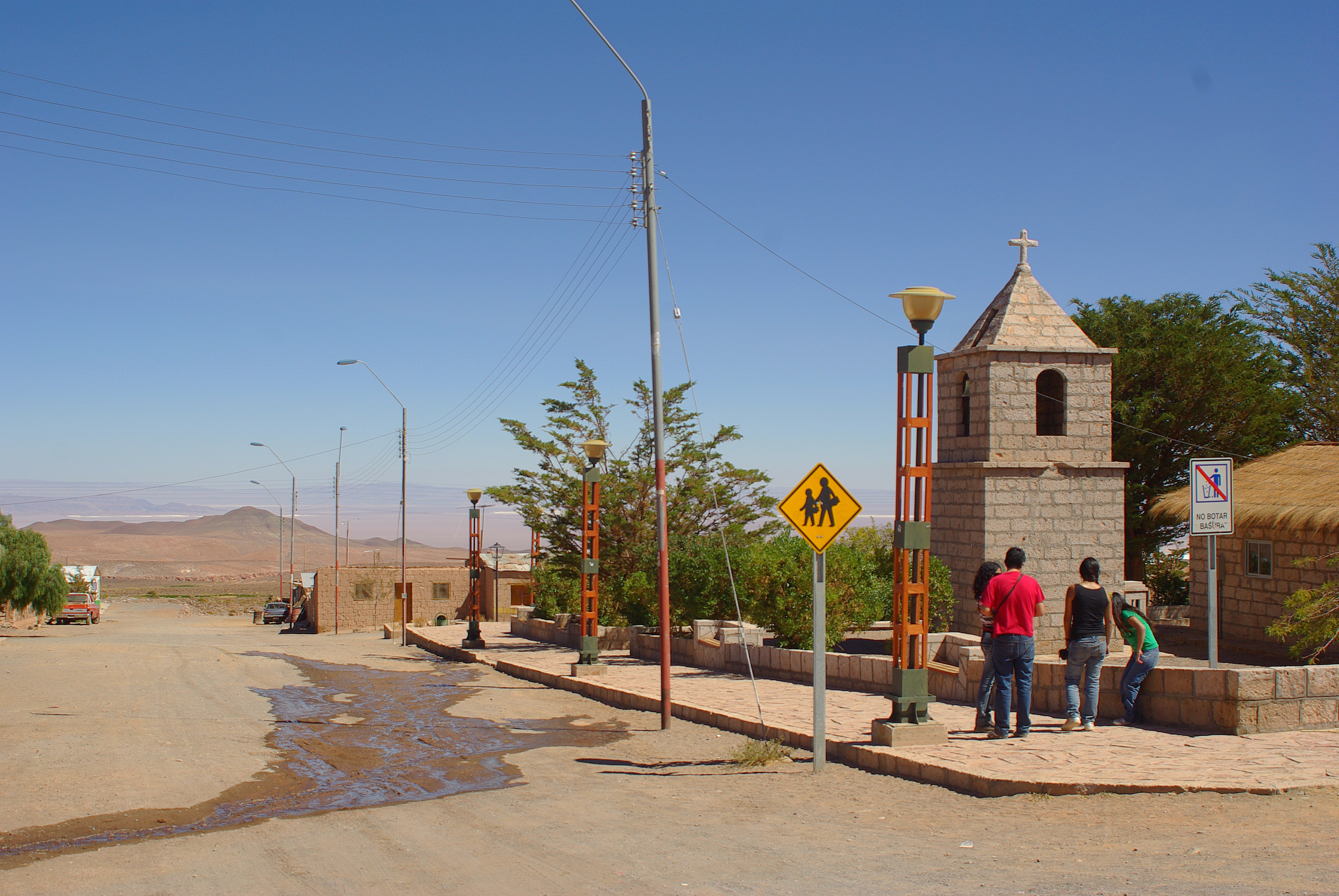 La iglesia nueva de Socaire, abril 2010